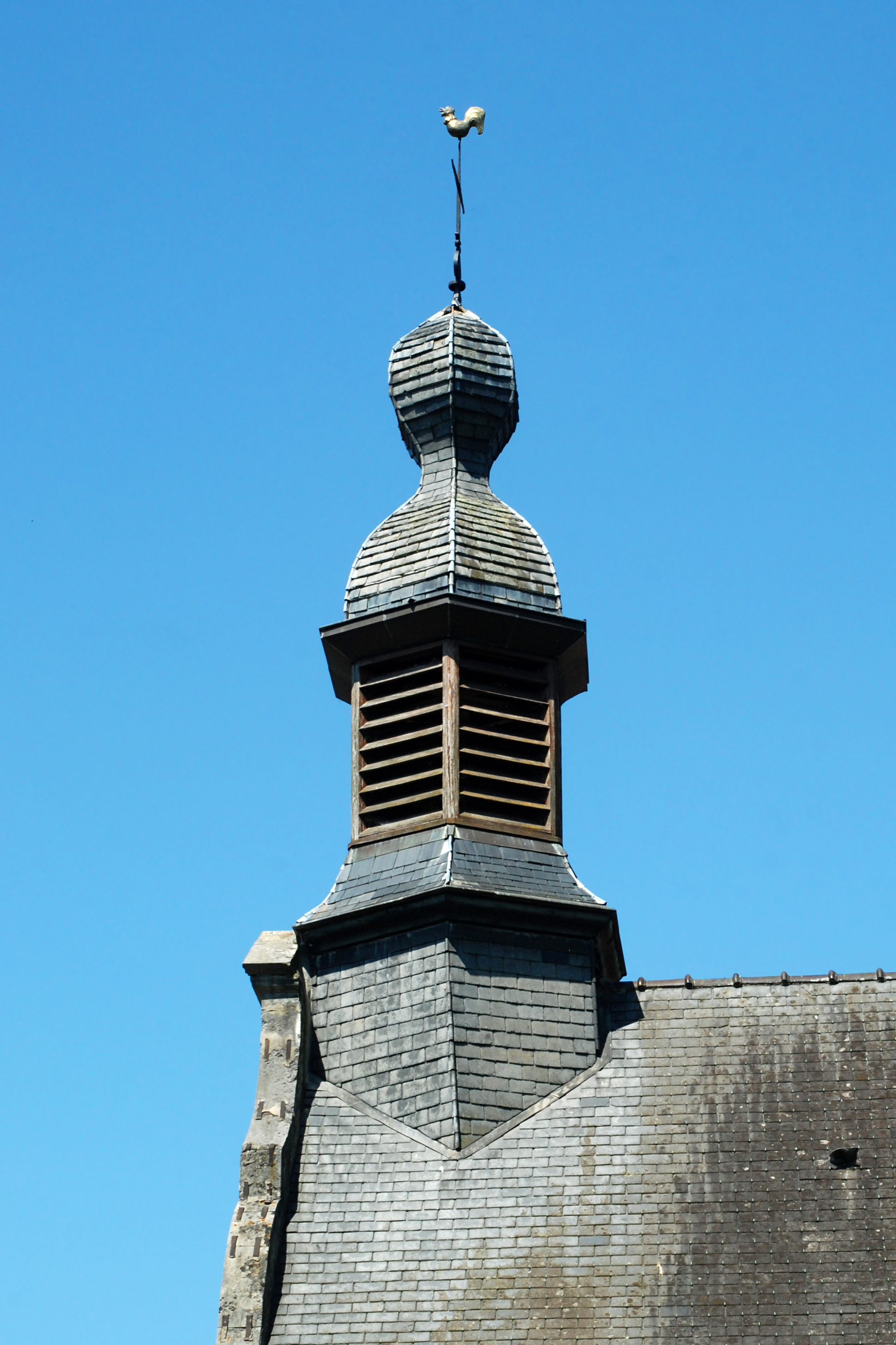 Belgique - Brabant flamand - Huldenberg - Neerijse - Chapelle Notre-Dame ten Pui